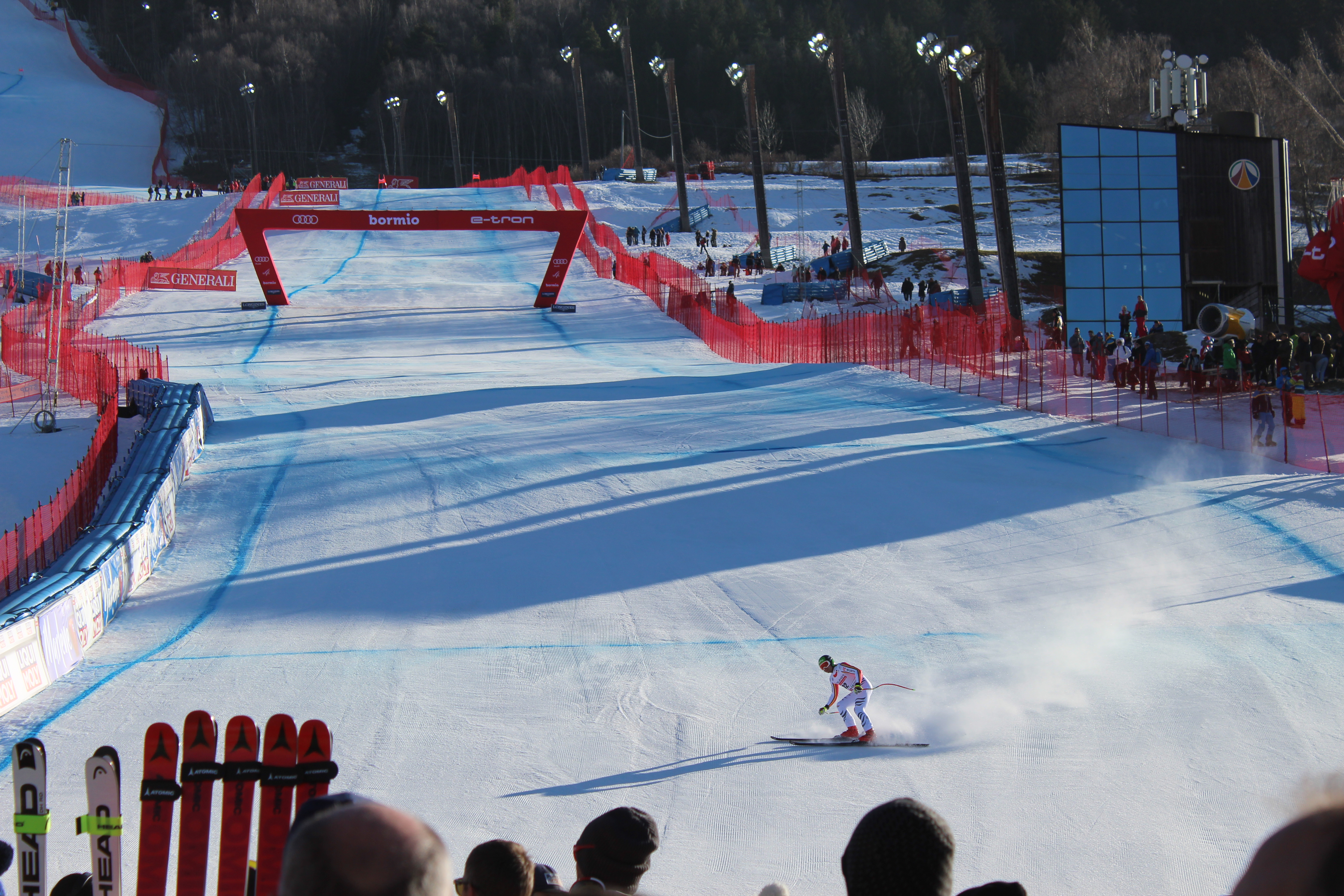 Lo sciatore alpino Andreas Sander al traguardo della Pista Stelvio di Bormio, durante la discesa libera del 28 dicembre 2019, valida per la Coppa del Mondo di sci 2019-2020